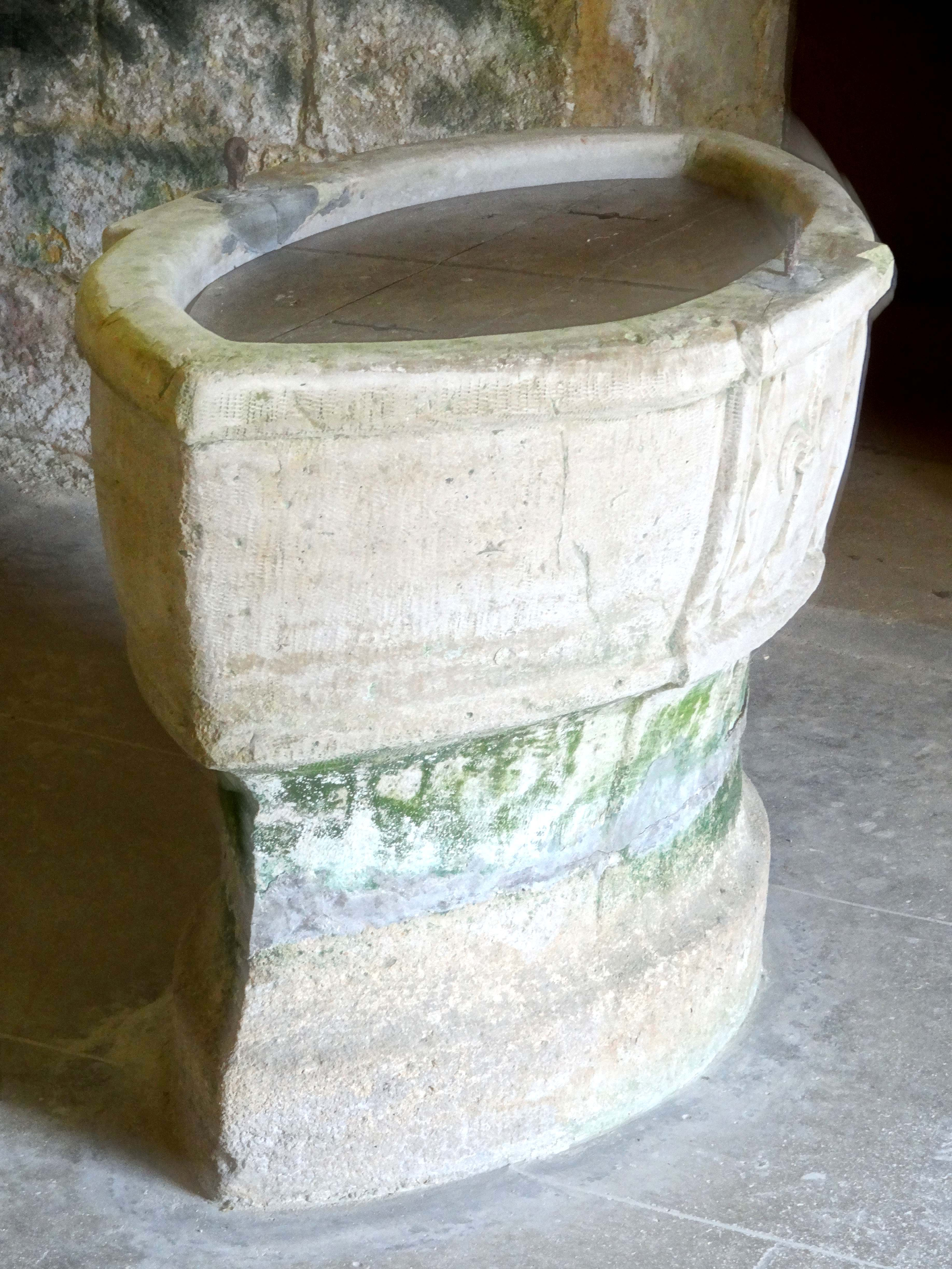 Mobilier de l'église - voir titre.